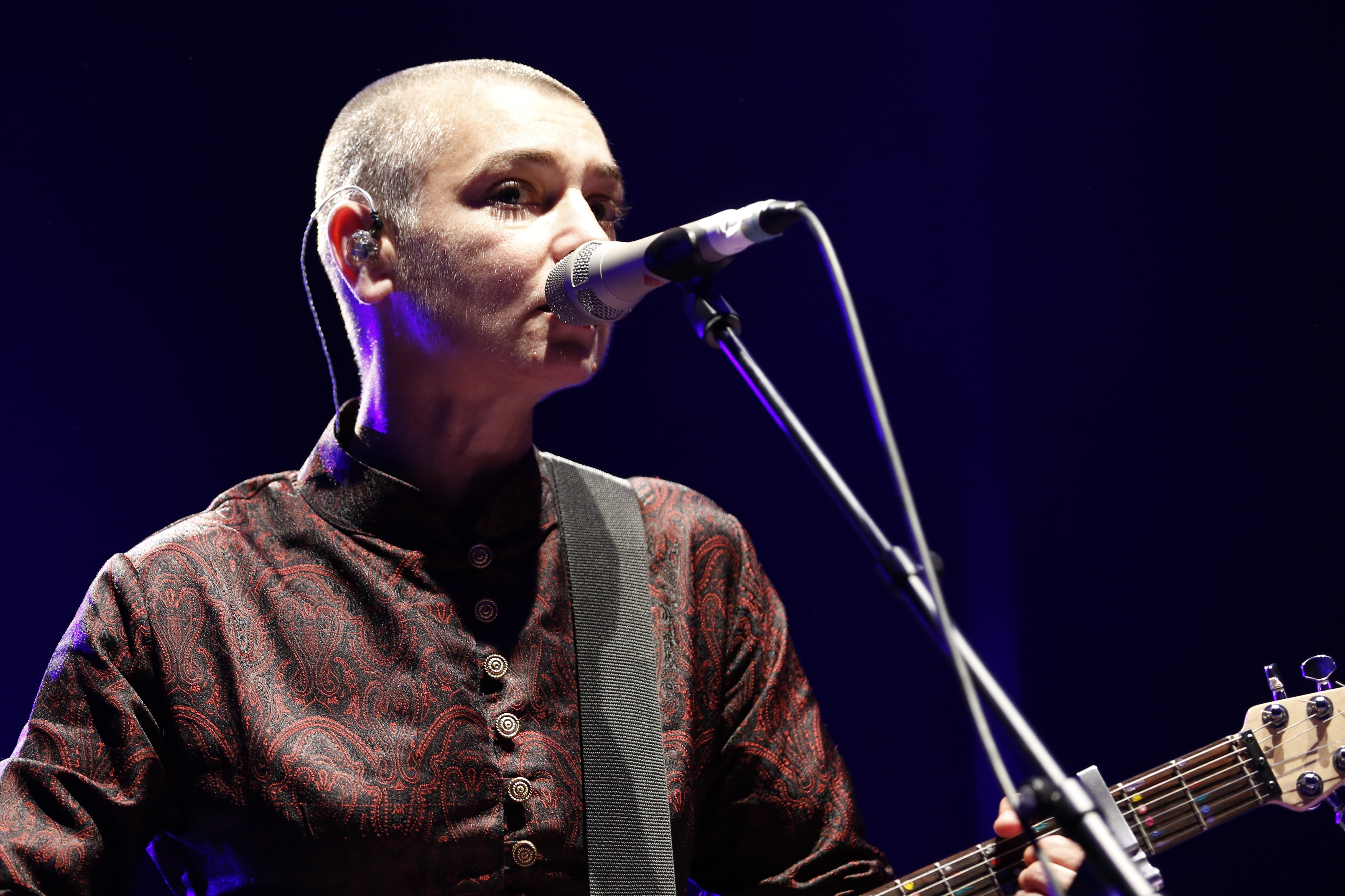 Sinéad O'Connor lors du Festival interceltique de Lorient, le 10 août 2013.